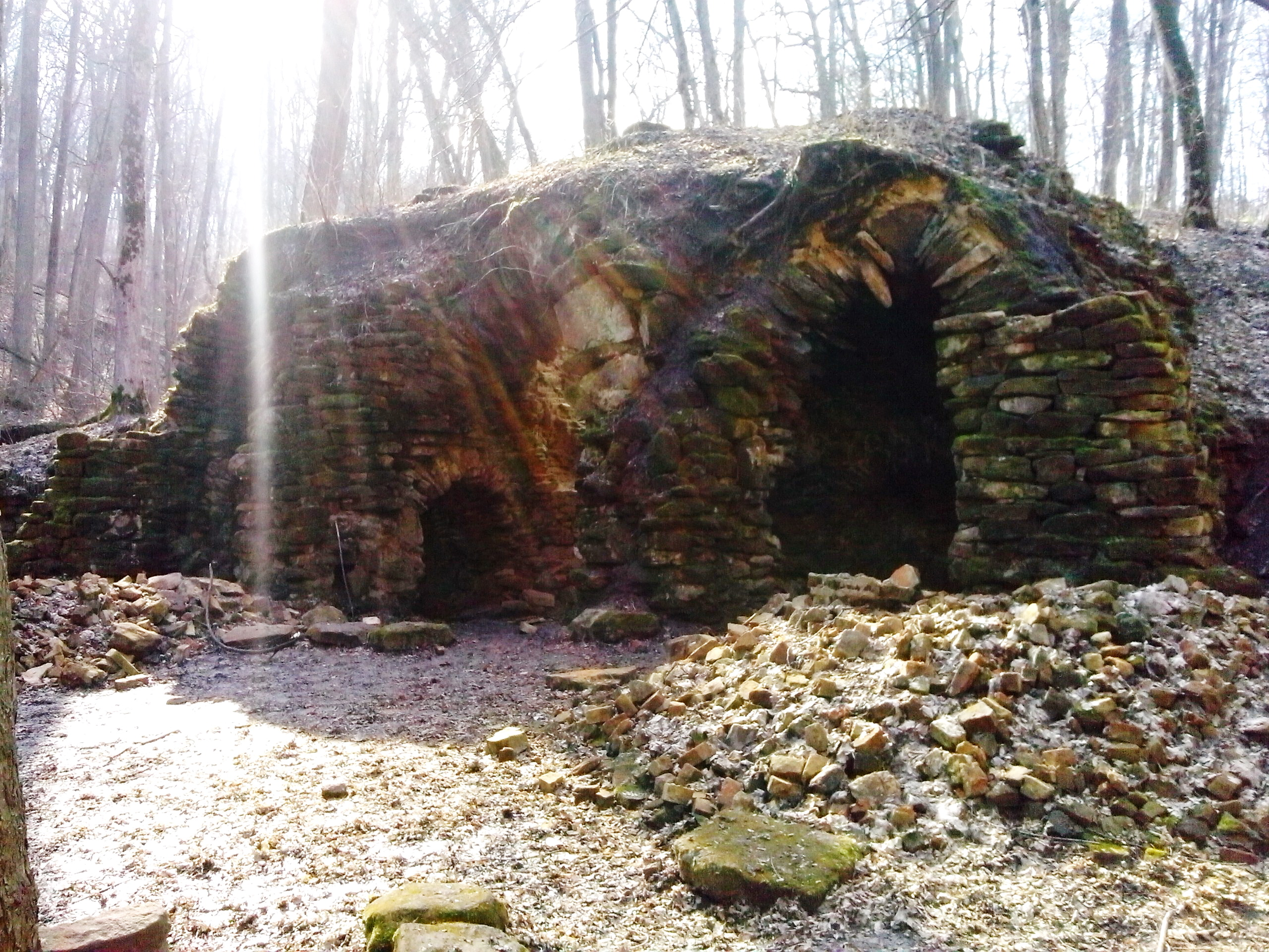 Грот Німф (мур.), Тростянець, парк «Нескучне»